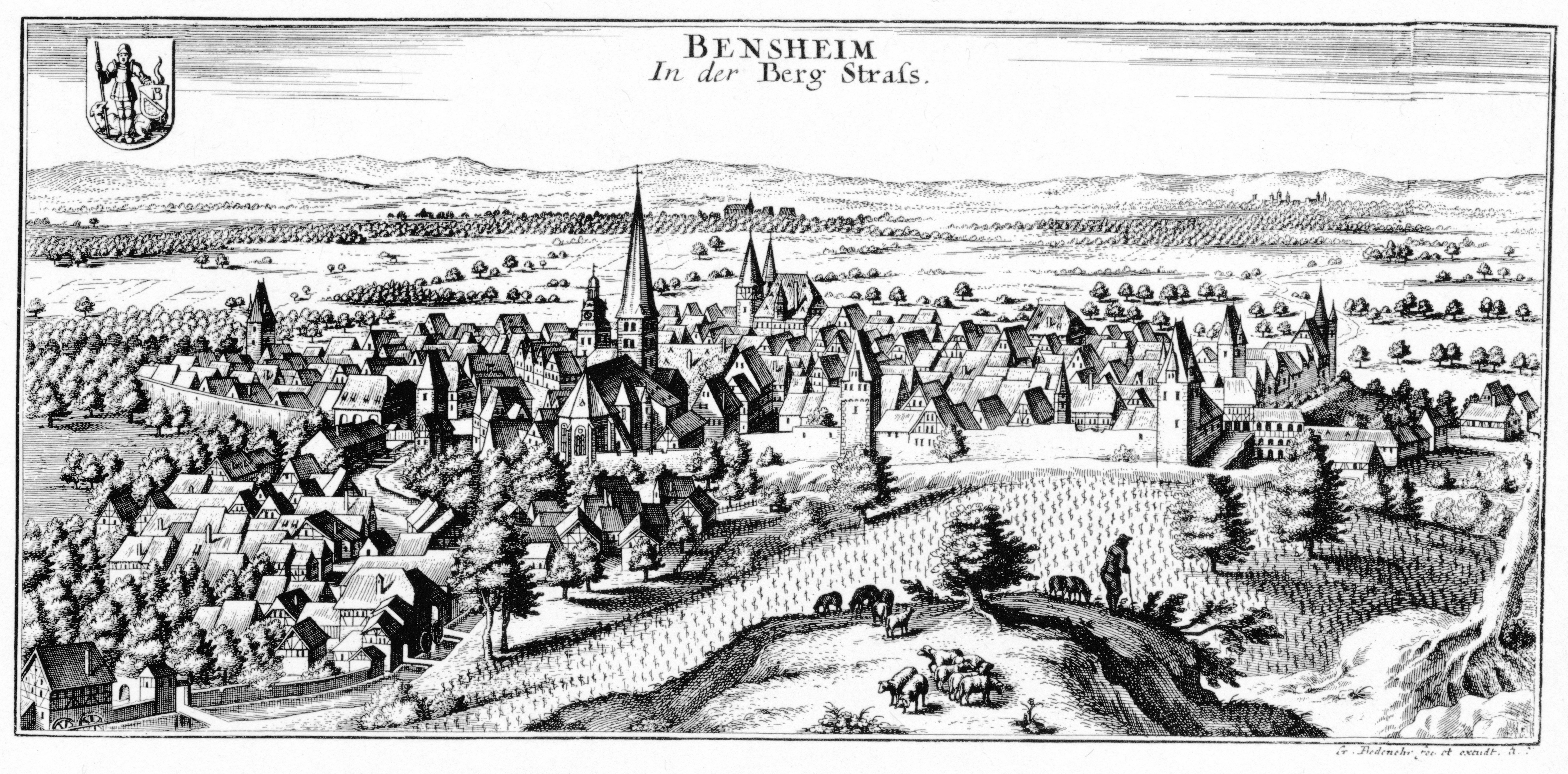 Ansicht von Bensheim, 1849, Stahlstich auf Papier, schwarz-weiß